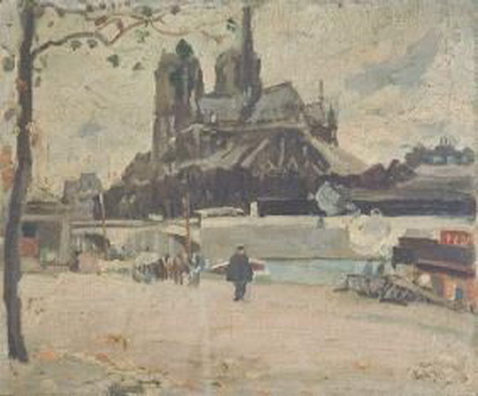 Artist George Oberteuffer 003.jpg (Собр Паризької Богородиці зі сходу)